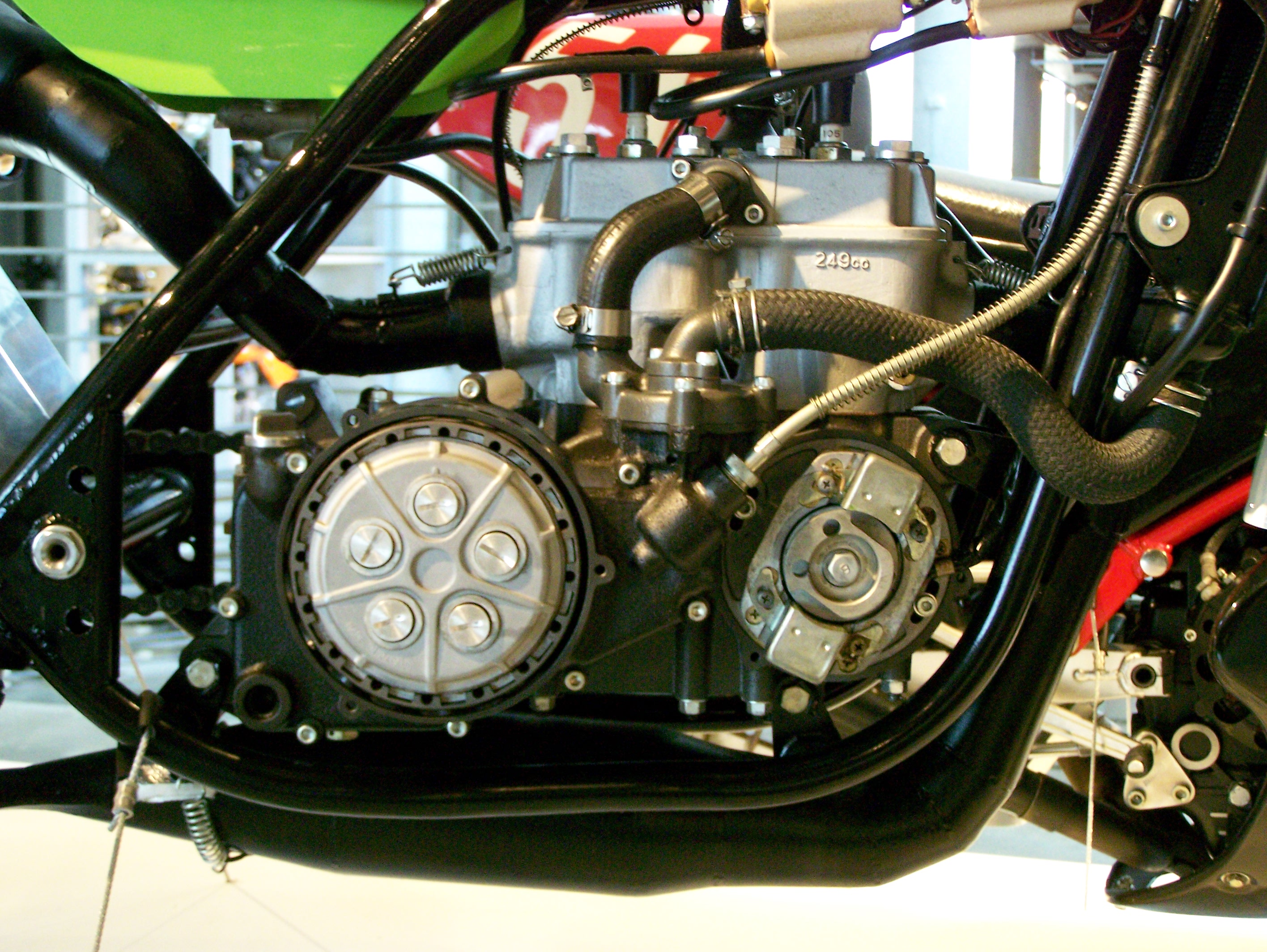 Barber Vintage Museum_382 1976 Kawasaki KR250